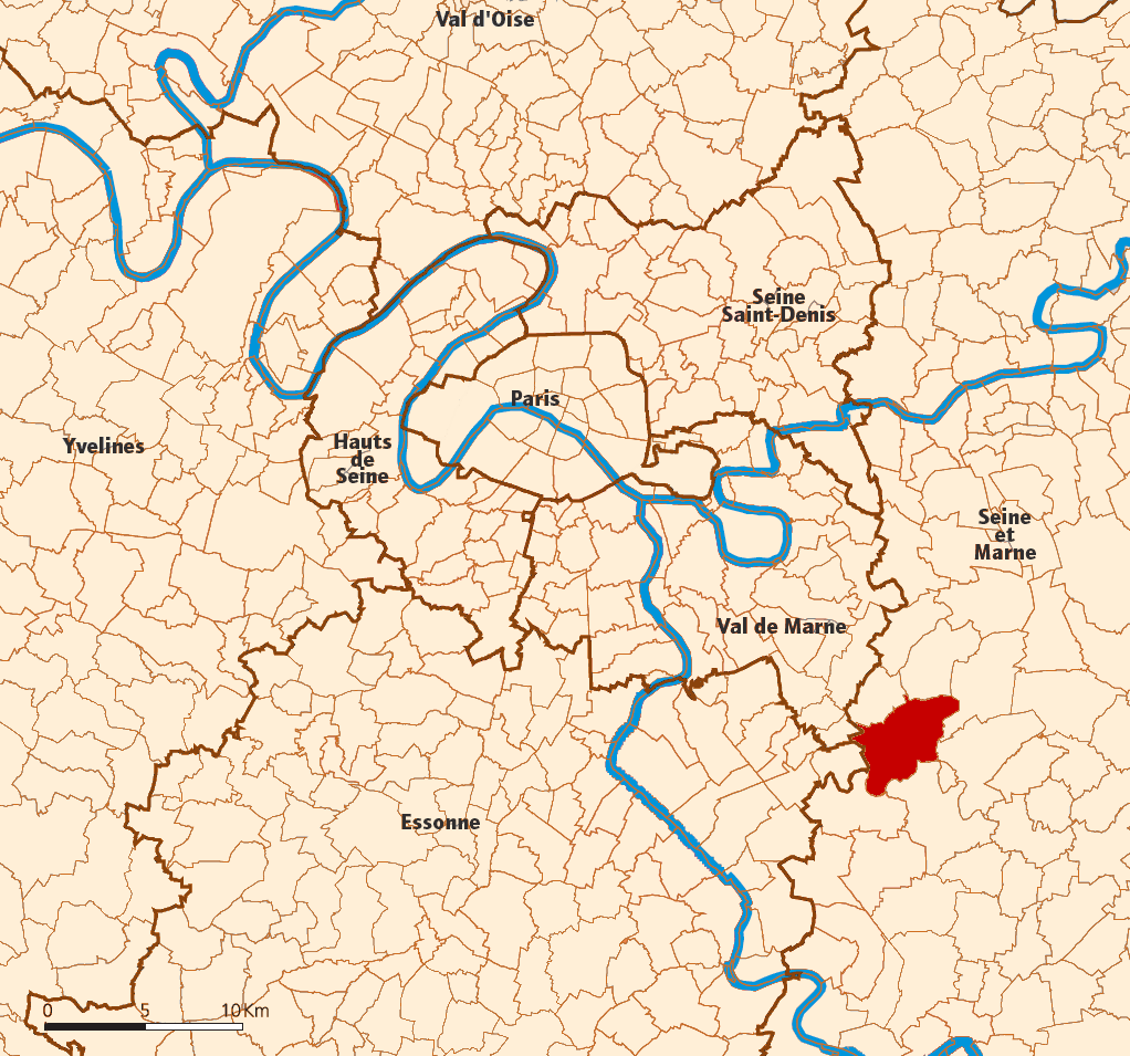 Localisation de Brie-Comte-Robert